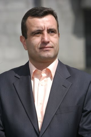 Վարդան Սեդրակյան